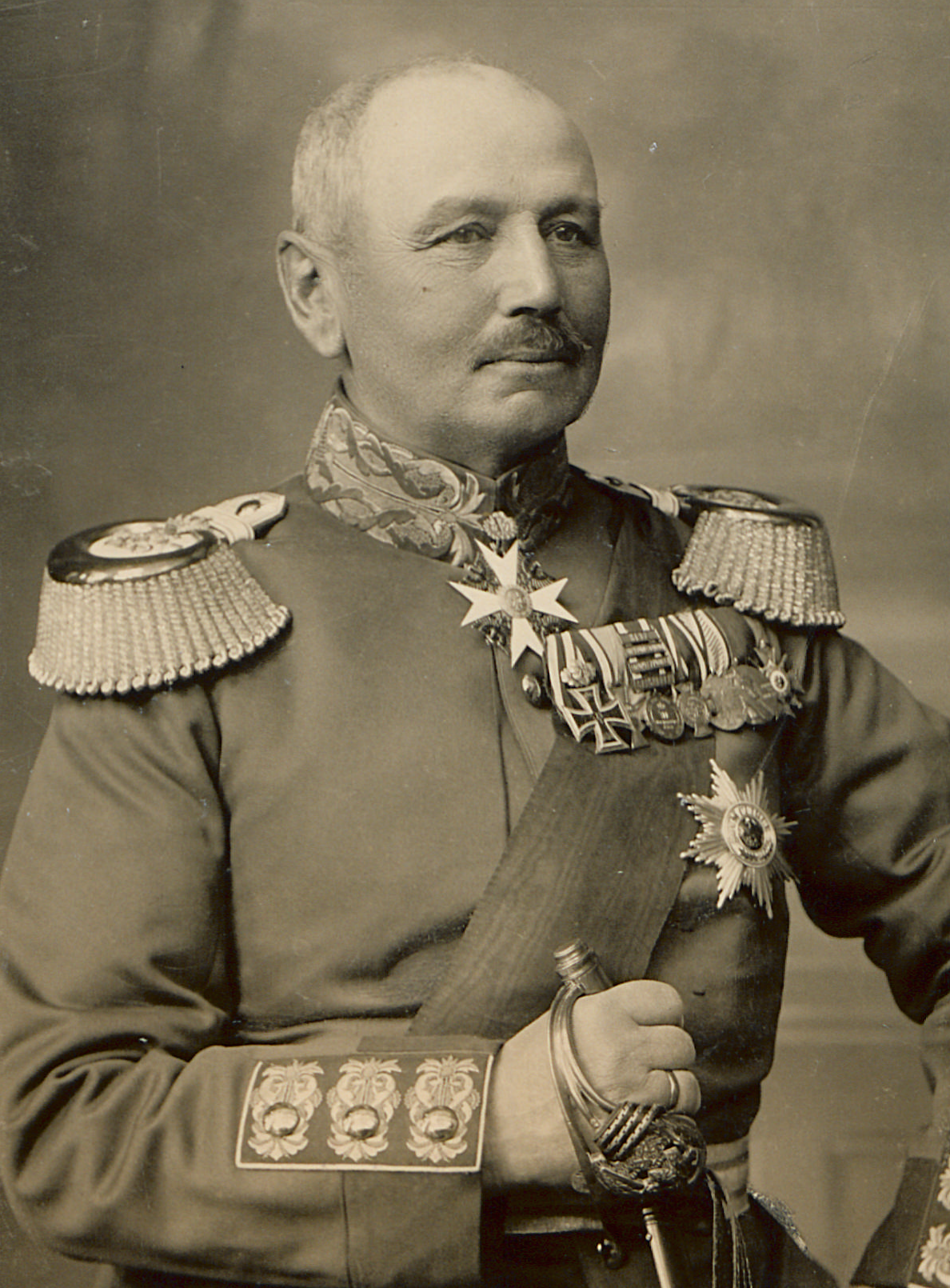 Bildnis Alexander von Kluck